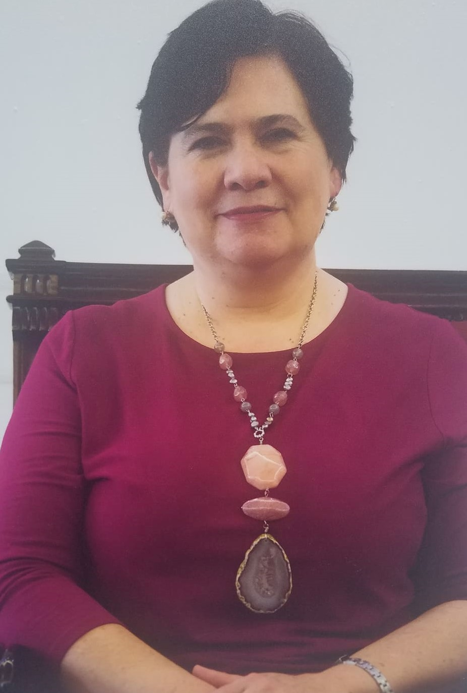 PhD.Florinella Muñoz- primera mujer Rectora de la EPN